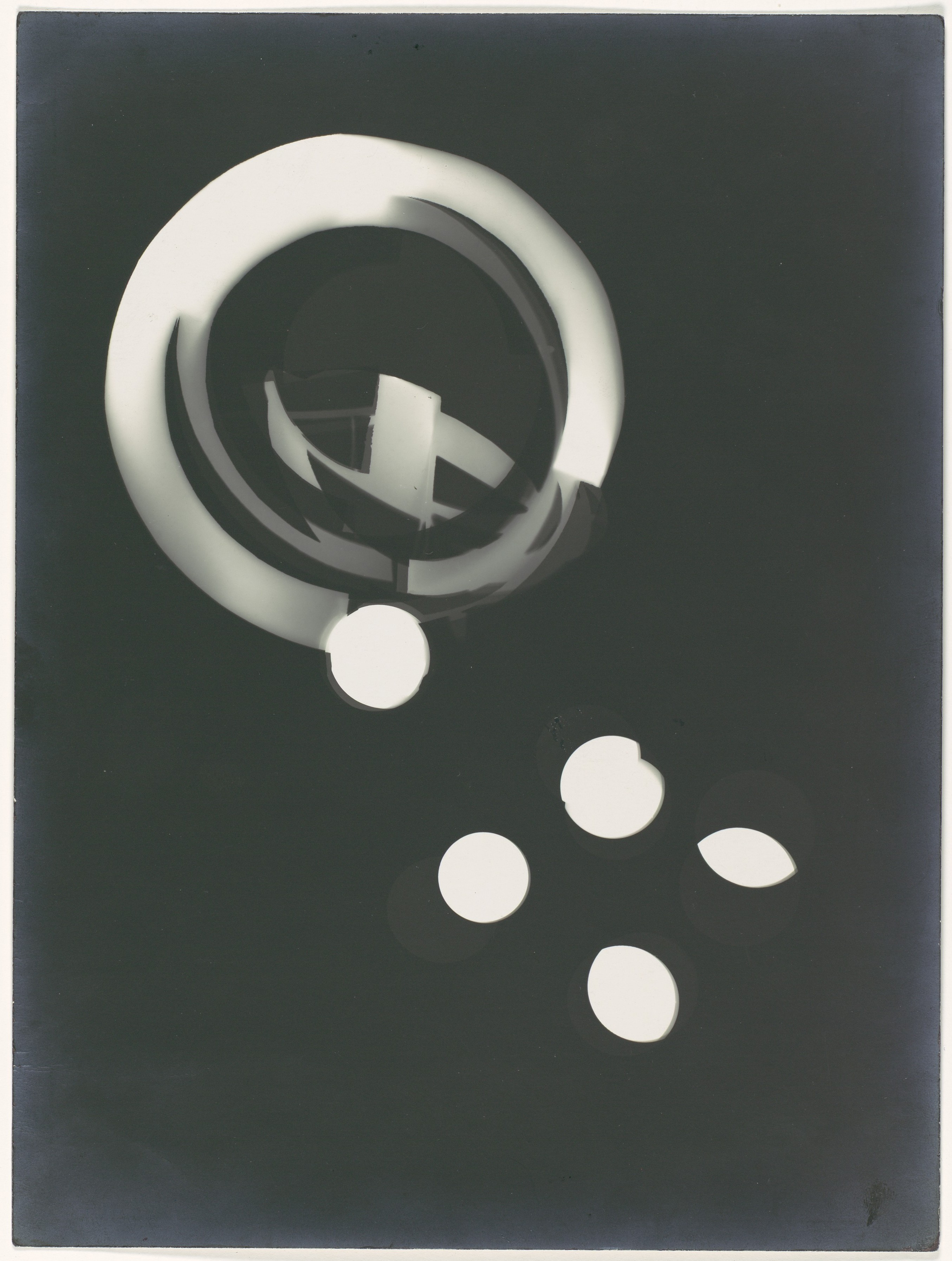 Photogram; Photographs